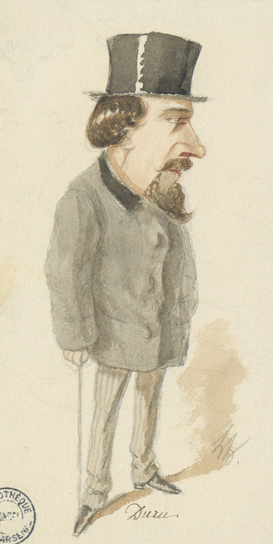 Alfred Duru (1829-1889)